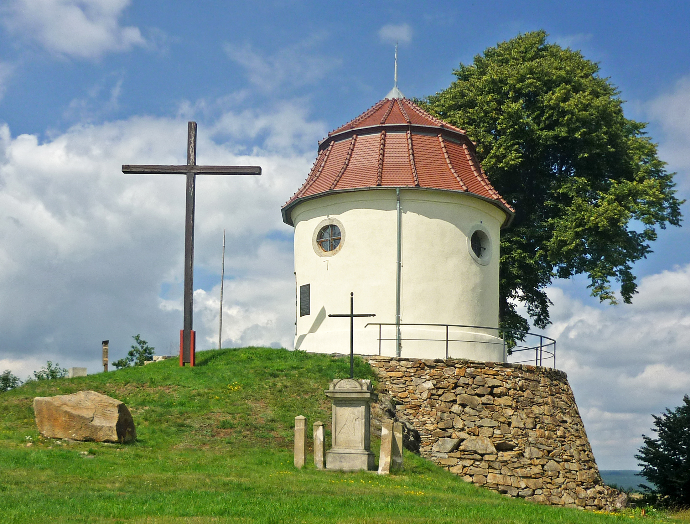 Kapelle des Hl. Leopold und der Hl. Anna in Gräflich Neundorf (Proszówka) in Niederschlesien (1657)